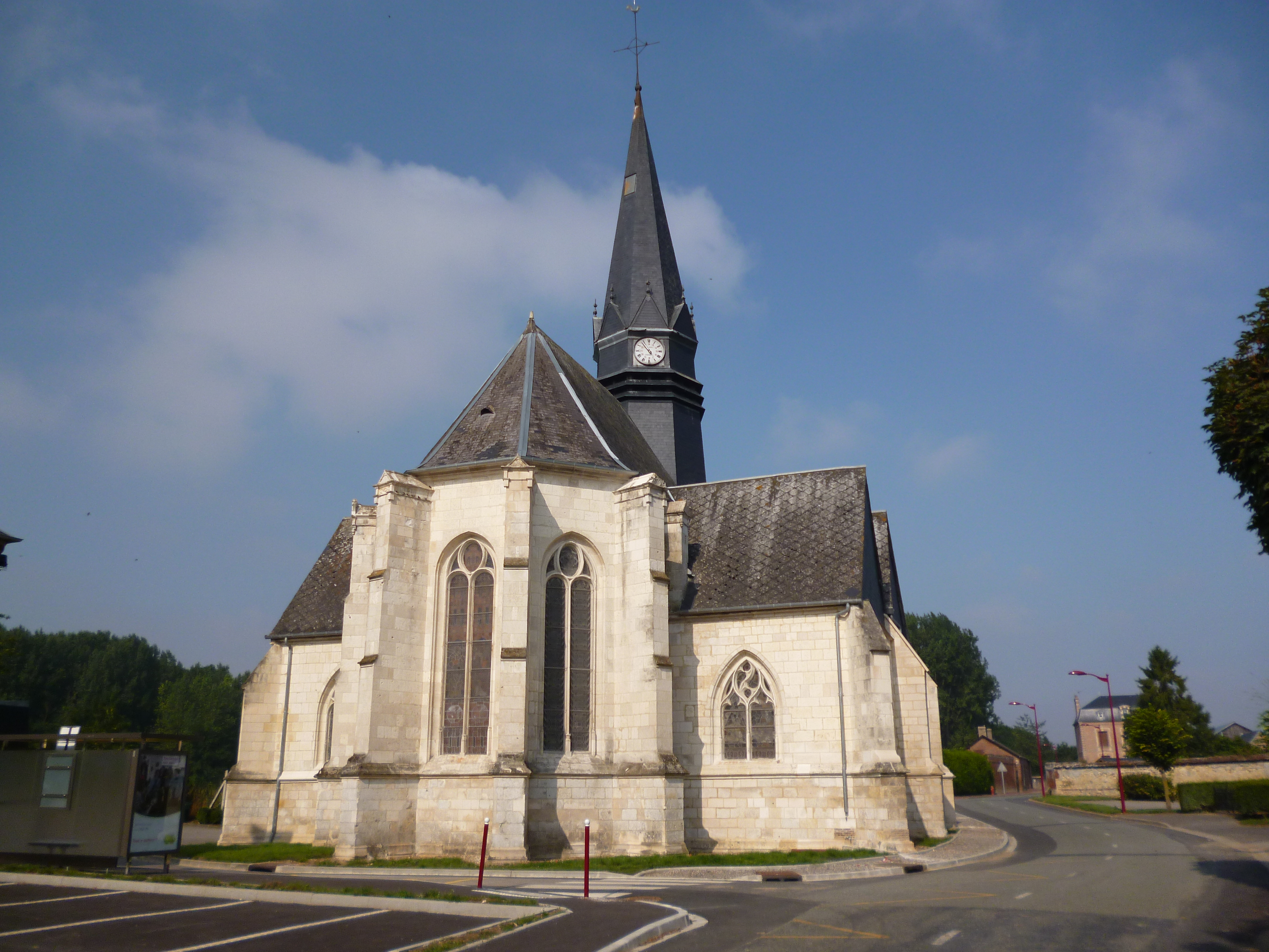 L'église de Reuil-sur-Brêche (Oise, Picardie).